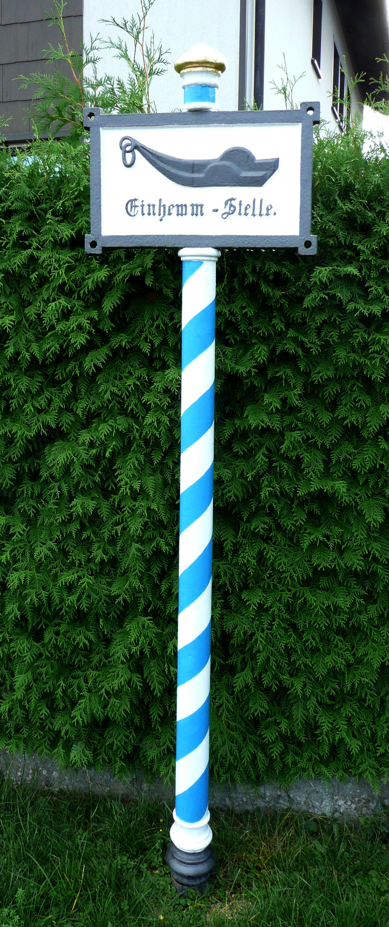 Einhemm-Stelle: Altes bayerisches Verkehrszeichen aus Gusseisen um 1870, das vor starkem Gefälle zum Anlegen des Hemmschuhs bei Pferdefuhrwerken und Pferdekutschen auffordert, um das Fuhrwerk genügend abzubremsen. Standort: Lenting bei Ingolstadt, Alte Landstraße. Laut königlicher Veröffentlichung kam ab dem 26. August 1870 eine Entschließung des Staatsministerium des Handels und der öffentlichen Arbeiten zum Tragen, nach der ältere Warnungstafeln zu entfernen seien, da sie mit dem aktualisierten Polizei-Strafgesetzbuch nicht mehr in Einklang standen. Nur noch an wenigen sicherheitsrelevanten Stellen sollten jetzt Tafeln aufgestellt werden. Die so abzusichernden Punkte an den Staatsstraßen betrafen Bergabfahrten, an denen ein Radschuh, Radschleifsperren oder Bremsvorrichtungen anzulegen waren, Brücken, bei denen besondere Befahrungsrichtlinien galten sowie glatteisgefährdete Stellen an denen nach dem Polizeigesetz Schneekettenpflicht herrschte. Die Warnungstafeln sollten bezüglich der Bergabfahrten einfach und einprägsam gehalten sein. Neben dem Sinnbild eines Radschuhs war lediglich die Unterschrift „Einhemmstelle“ anzubringen, wogegen an Brücken der polizeiliche Gesetzestext sichtbar sein mußte. Quelle: Warnungs- und Radschuhtafeln an den Staatsstraßen betr. In: Königlich Bayerisches Kreis-Amtsblatt von Oberbayern, Nr. 76, 2. September 1870. Sp. 1875−1877. This is a photograph of an architectural monument.